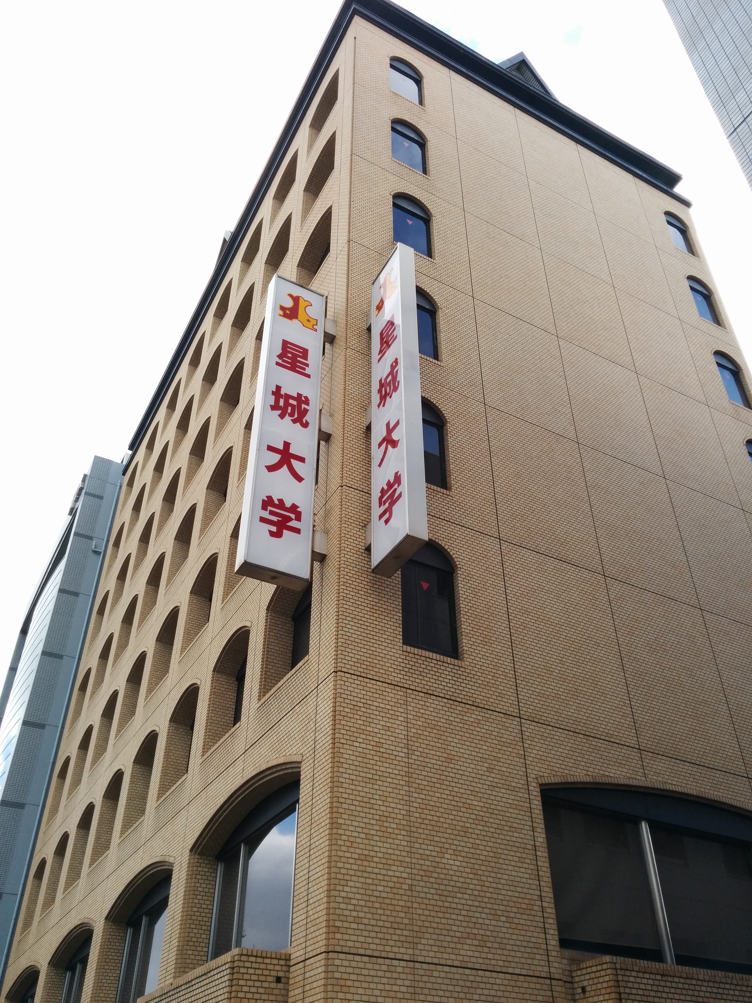 Marunouchi